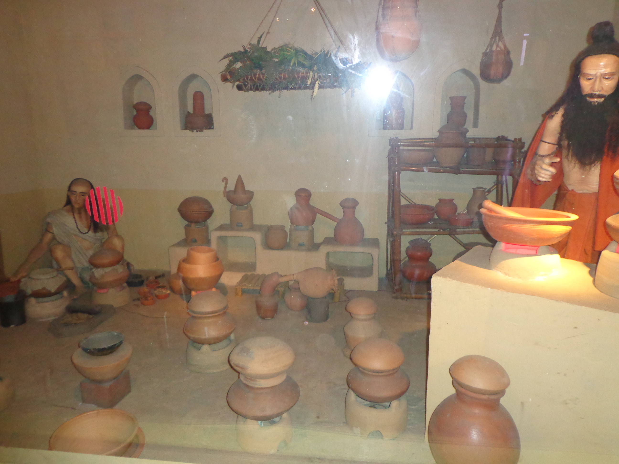 தமிழ் மருத்துவம் இப்படம் டெல்லி தேசிய மியுசியத்தில் எடுத்தது